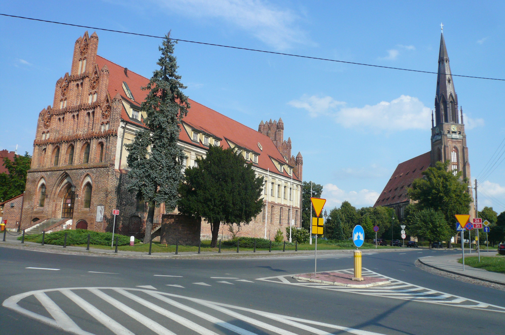 Najważniejsze zabytki Chojny: dawny ratusz i Kościół Mariacki